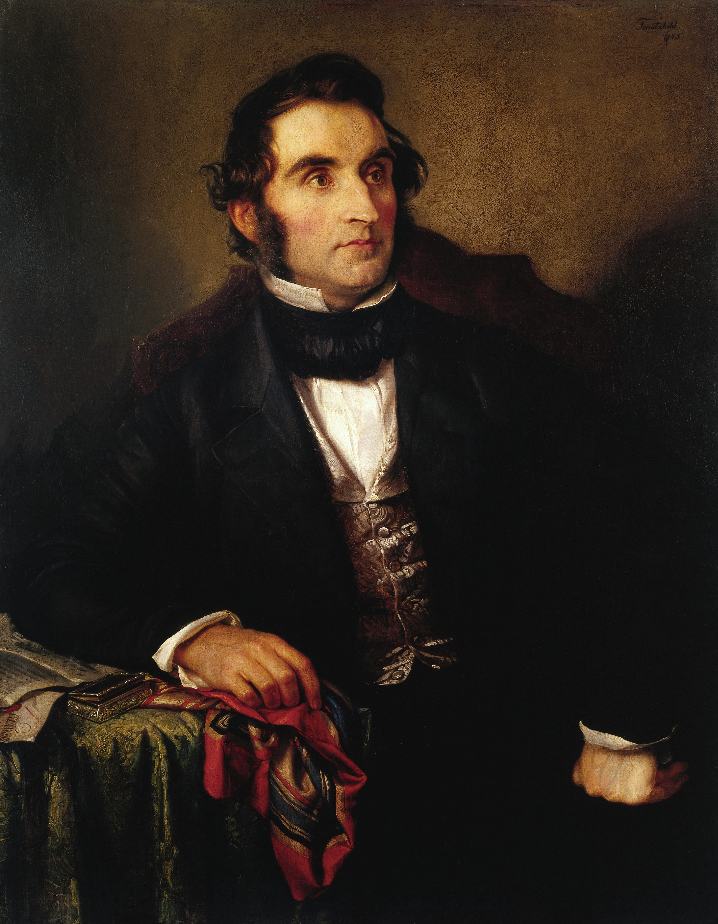 Justus von Liebig (1803-1873), chemist